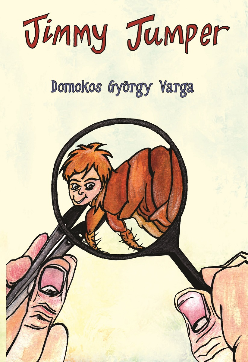 A Bilhebolha angolul (Jimmy Jumper, Vanguard Press, 2018)